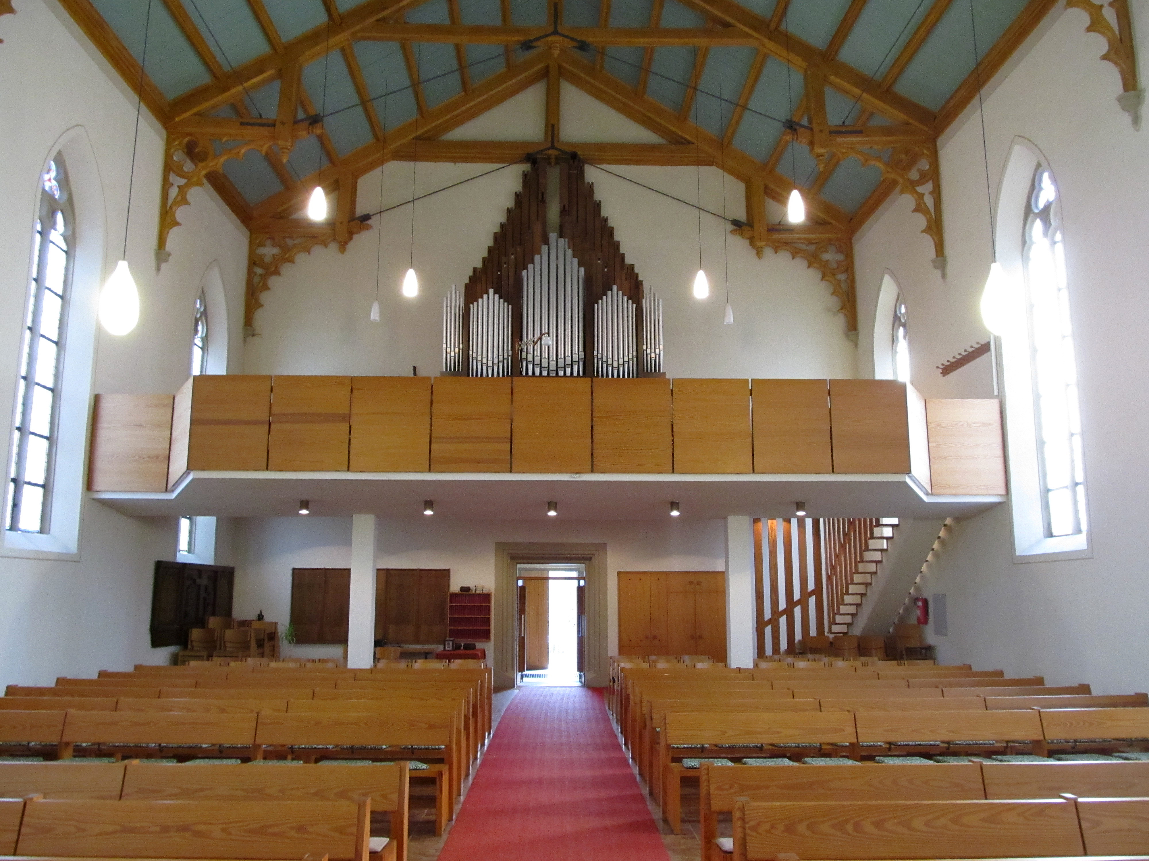 Blick ins Innere der protestantischen Friedenskirche in Kirkel, Saarland